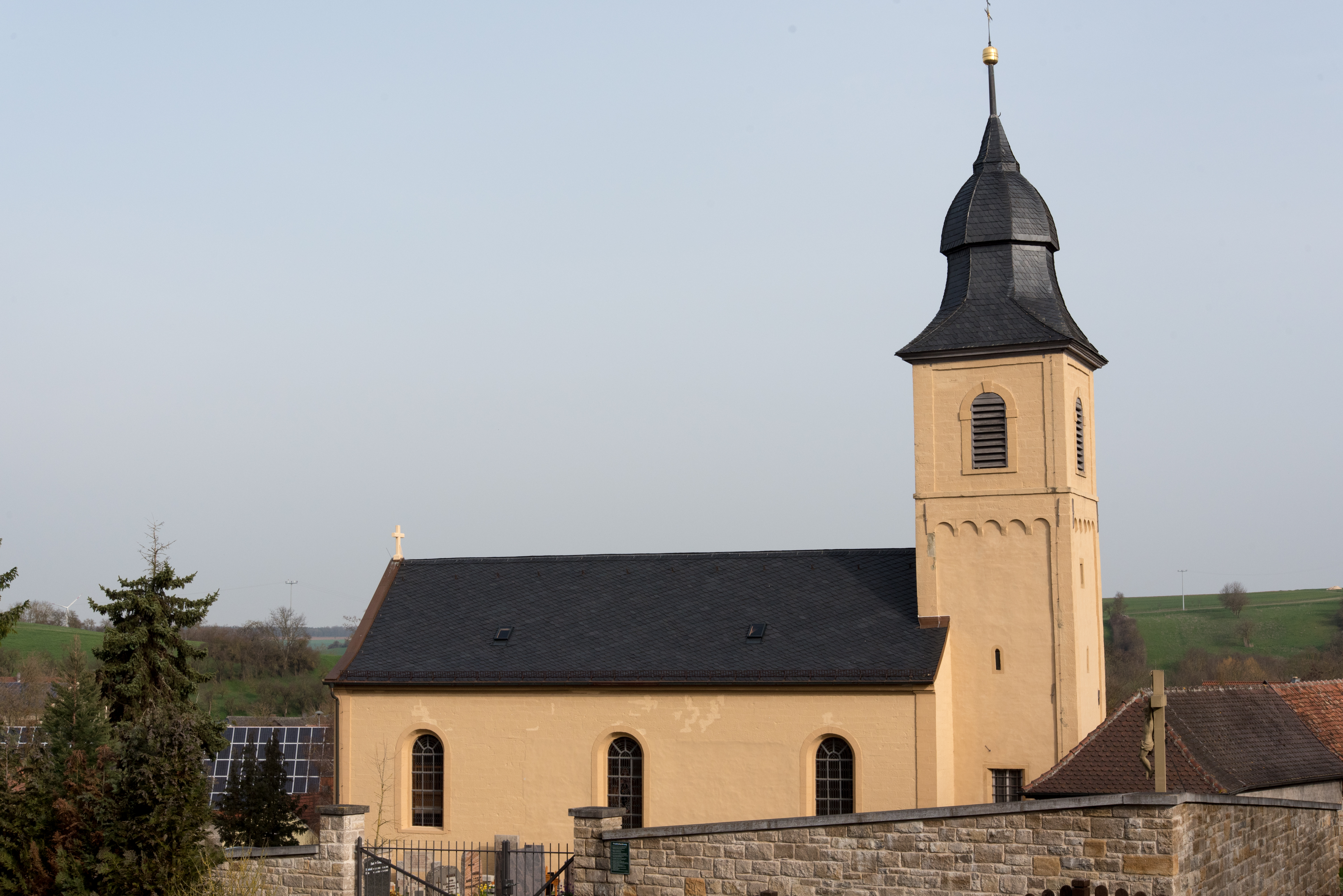 Seinsheim, Iffigheim 60